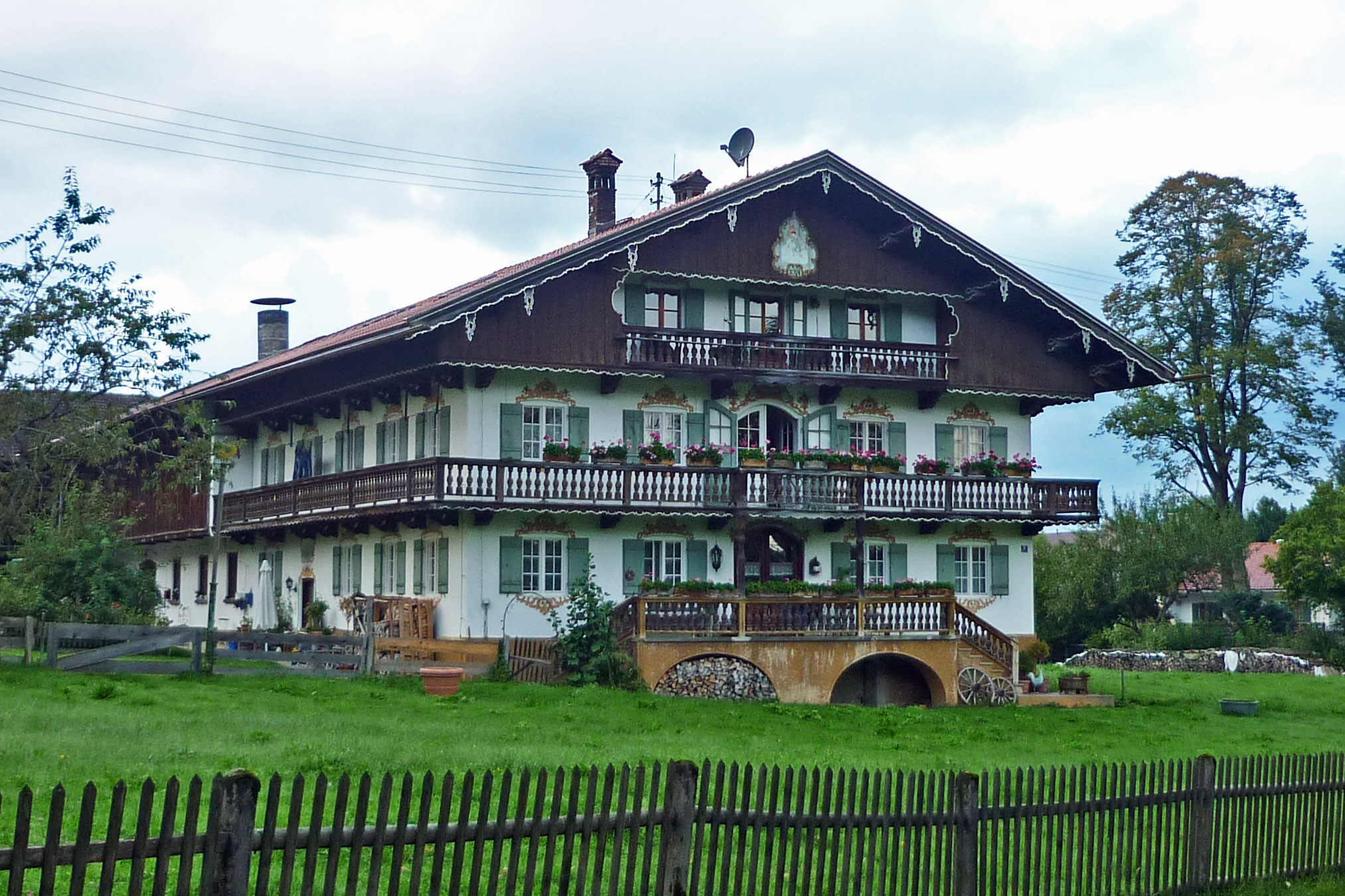 Bauernhaus (1914) in Ostin, OT von Gmund am Tegernsee, Neureuthstr. 4This is a photograph of an architectural monument.